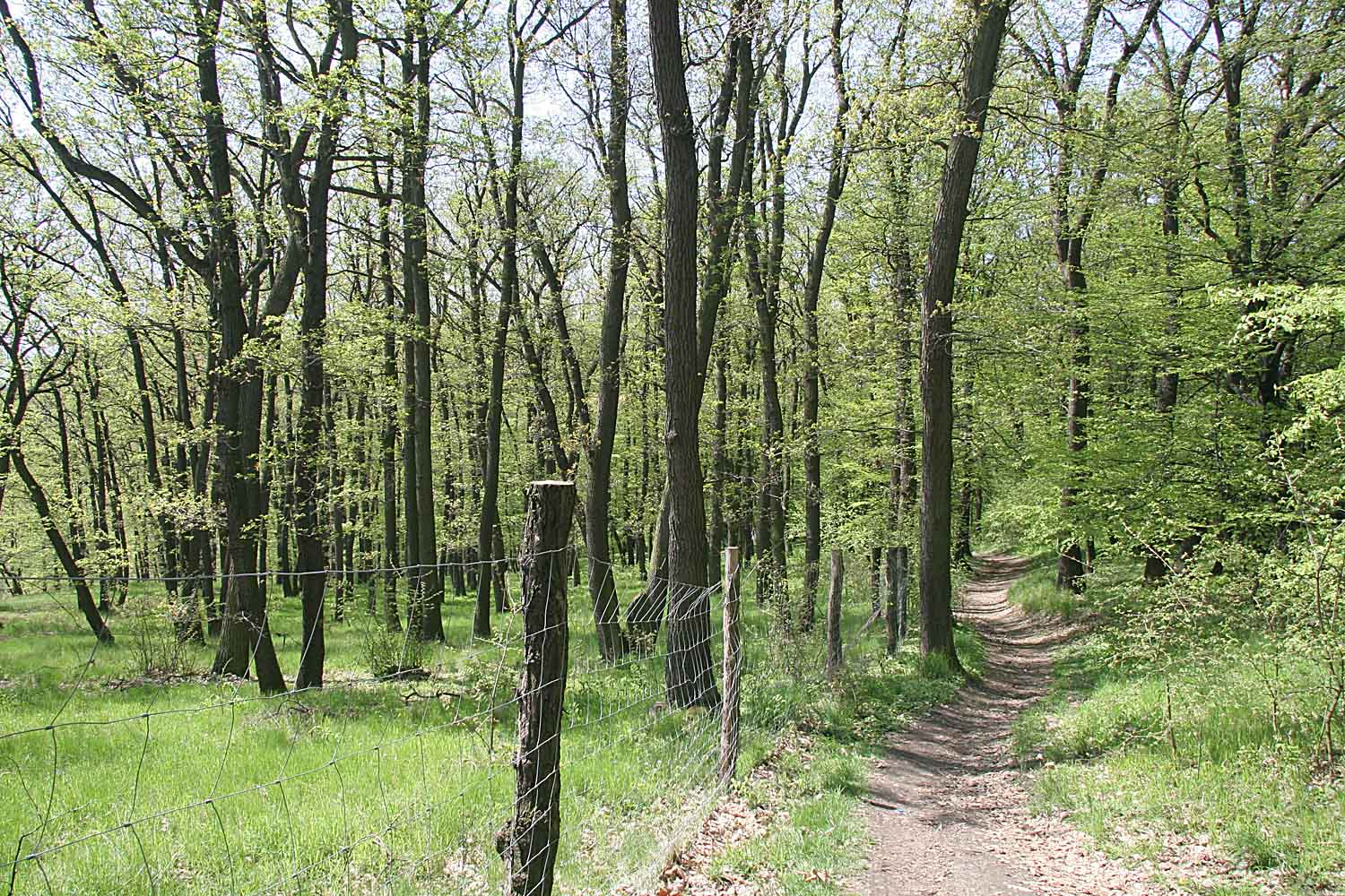 Přírodní rezervace Staňkovka v Praze-Radotíně. autor:Zp licence: Self_GFDL_and_cc-by-sa-2.5